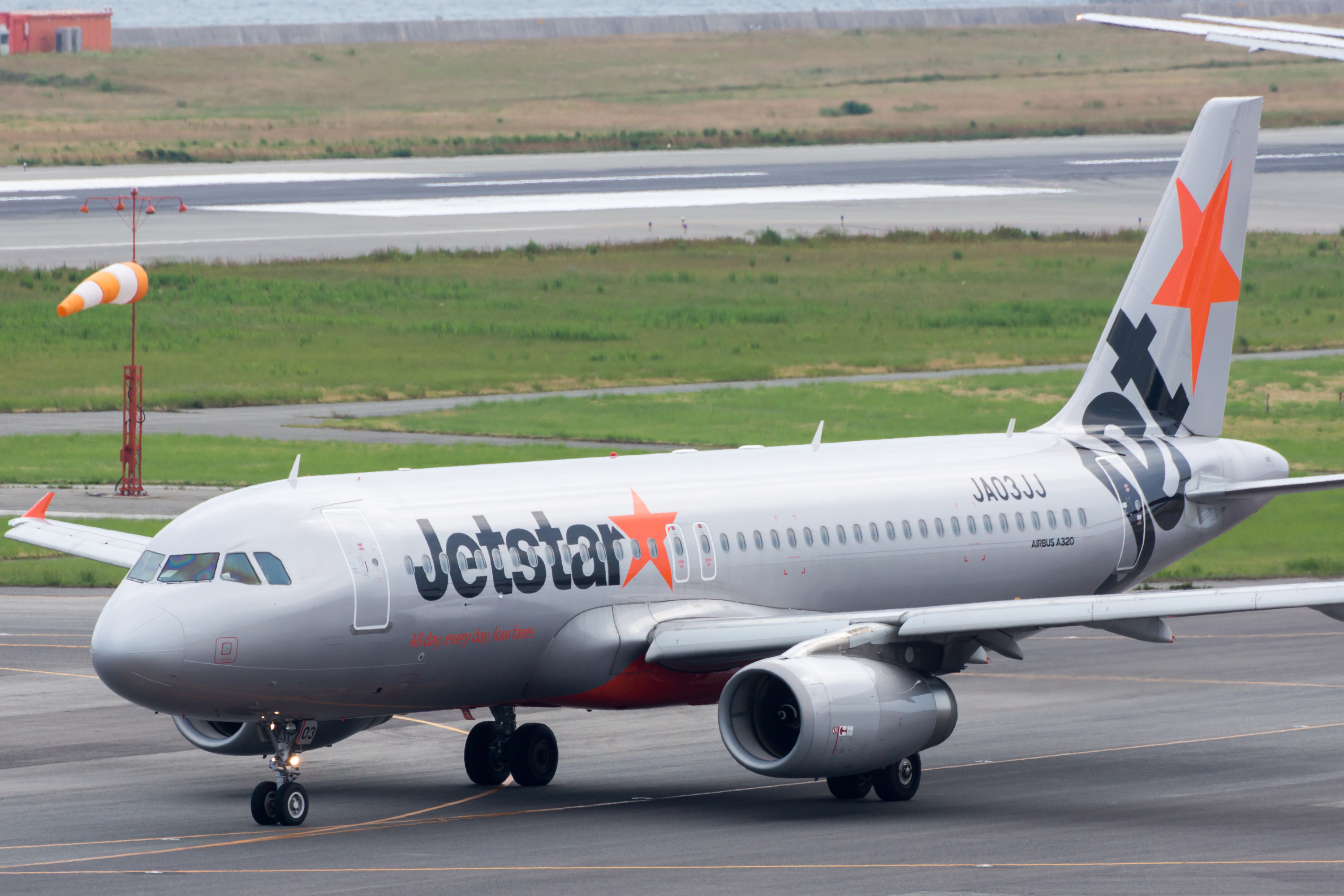 Jetstar Japan / ジェットスター・ジャパン Airbus A320-232 JA03JJ GK353, Departed to Naha Osaka Kansai Int'l Airport